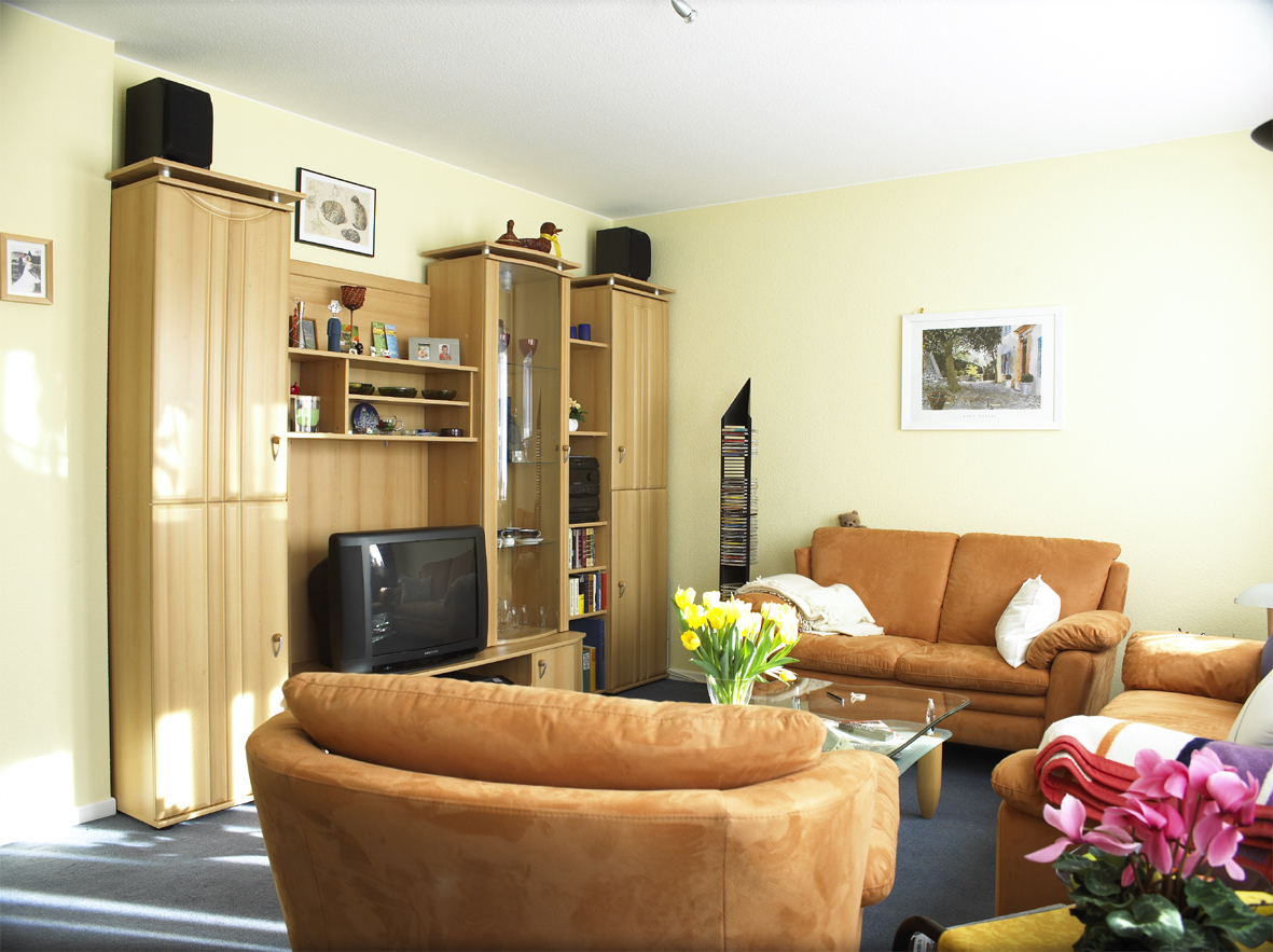 Gesamtansicht von Deutschlands häufigstem Wohnzimmer.